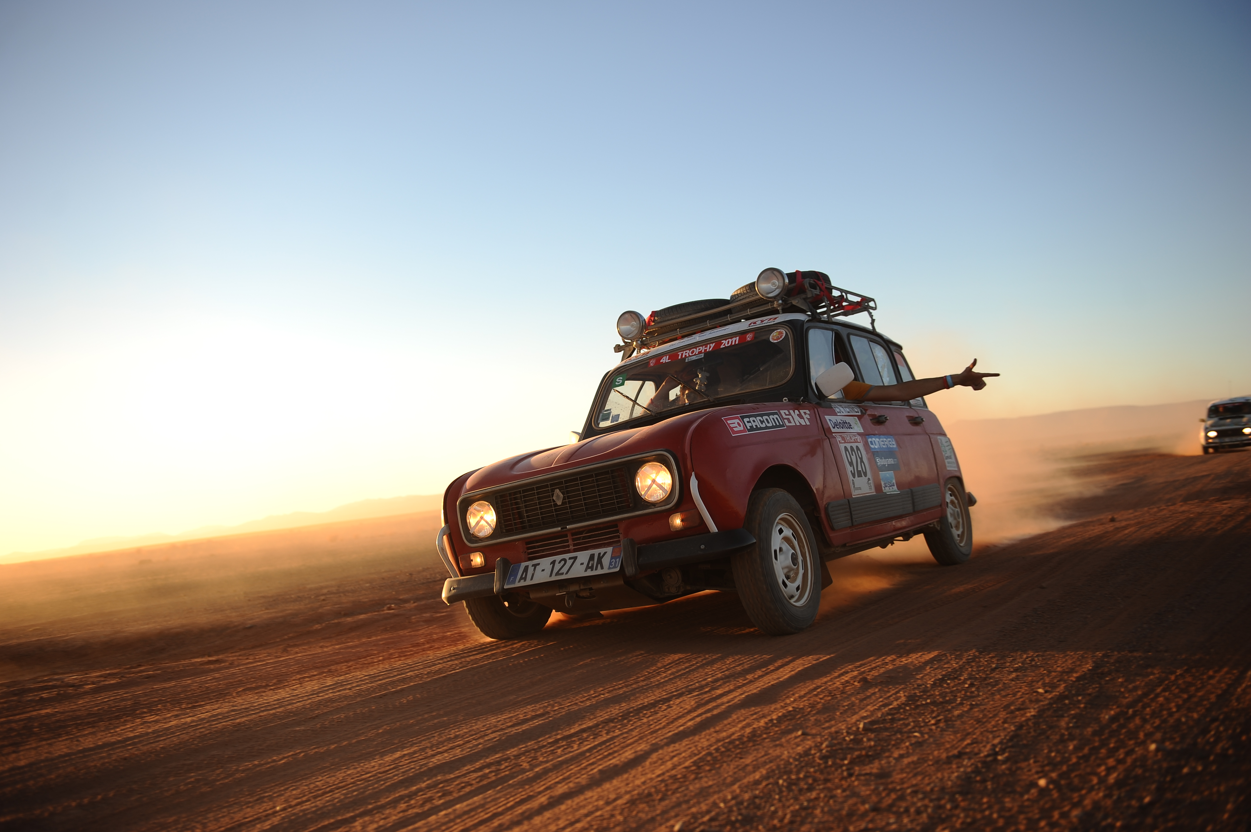 4L GTL de l'équipage 928 sur les piste du 4L Trophy 2011